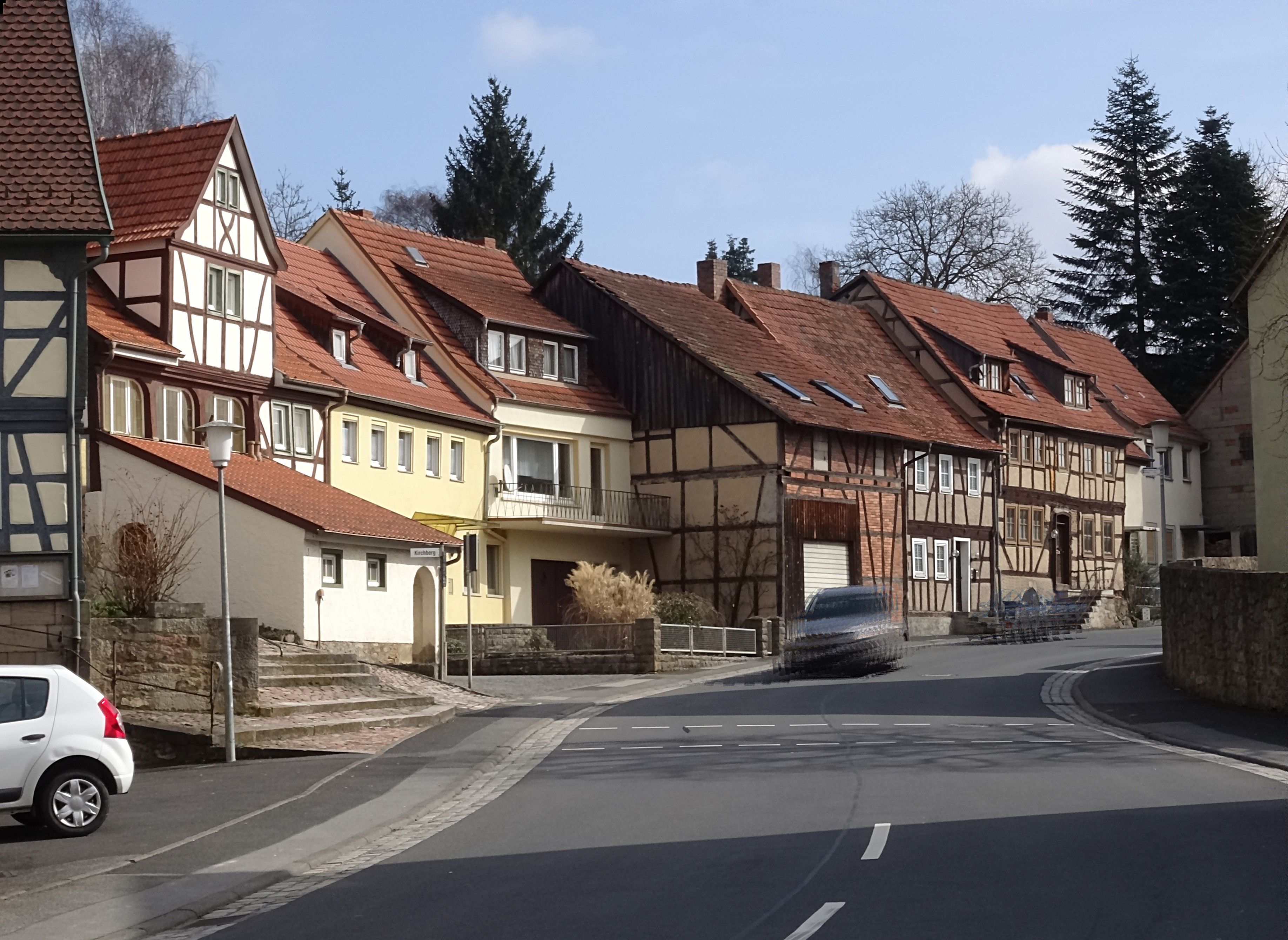 Nordheim vor der Rhön